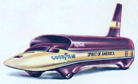 Craig Breedlove sur Spirit America Sonic 1, RM de vitesse en 1965 (966.571kmh).